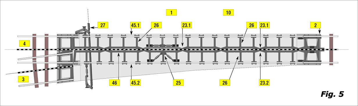 GLEISWEICHE / TRACK POINTS / AIGUILLAGE: RIGI-VTW 2000 Europäisches Patentamt / EUROPÄISCHE PATENTSCHRIFT / EP 1 214 473 B1 / 20.07.2005 Patentblatt 2005/29 / Anmeldenummer: 00958083.8 Anmeldetag: 18.09.2000 / Int Cl.7: E01B 25/06 / Internationale Anmeldenummer: PCT/CH2000/000502 Internationale Veröffentlichungsnummer: WO 2001/021894 (29.03.2001 Gazette 2001/13)